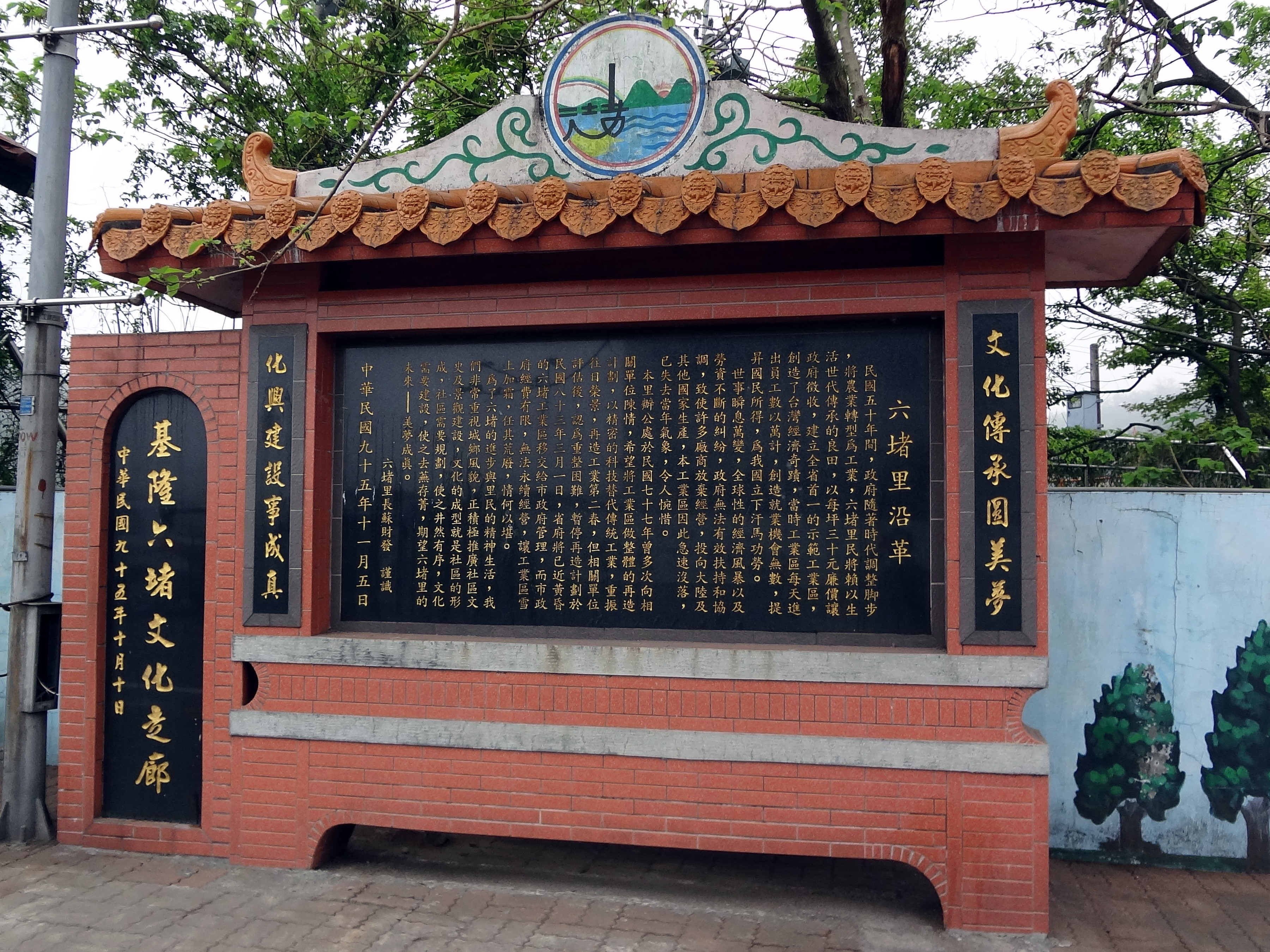 中文（台灣）: 六堵里沿革碑記，位於基隆市七堵區工建西路，2006年11月5日六堵里里長蘇財發撰文。